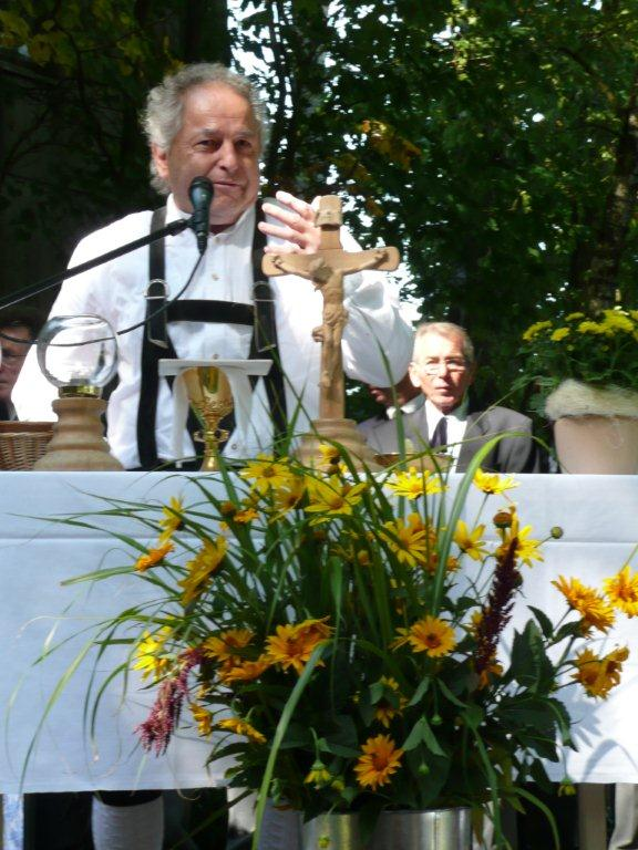 Hermann Frieser, Ehrenbürger der ehem. Gemeinde Massenricht, am Turmfest 15. August 2012